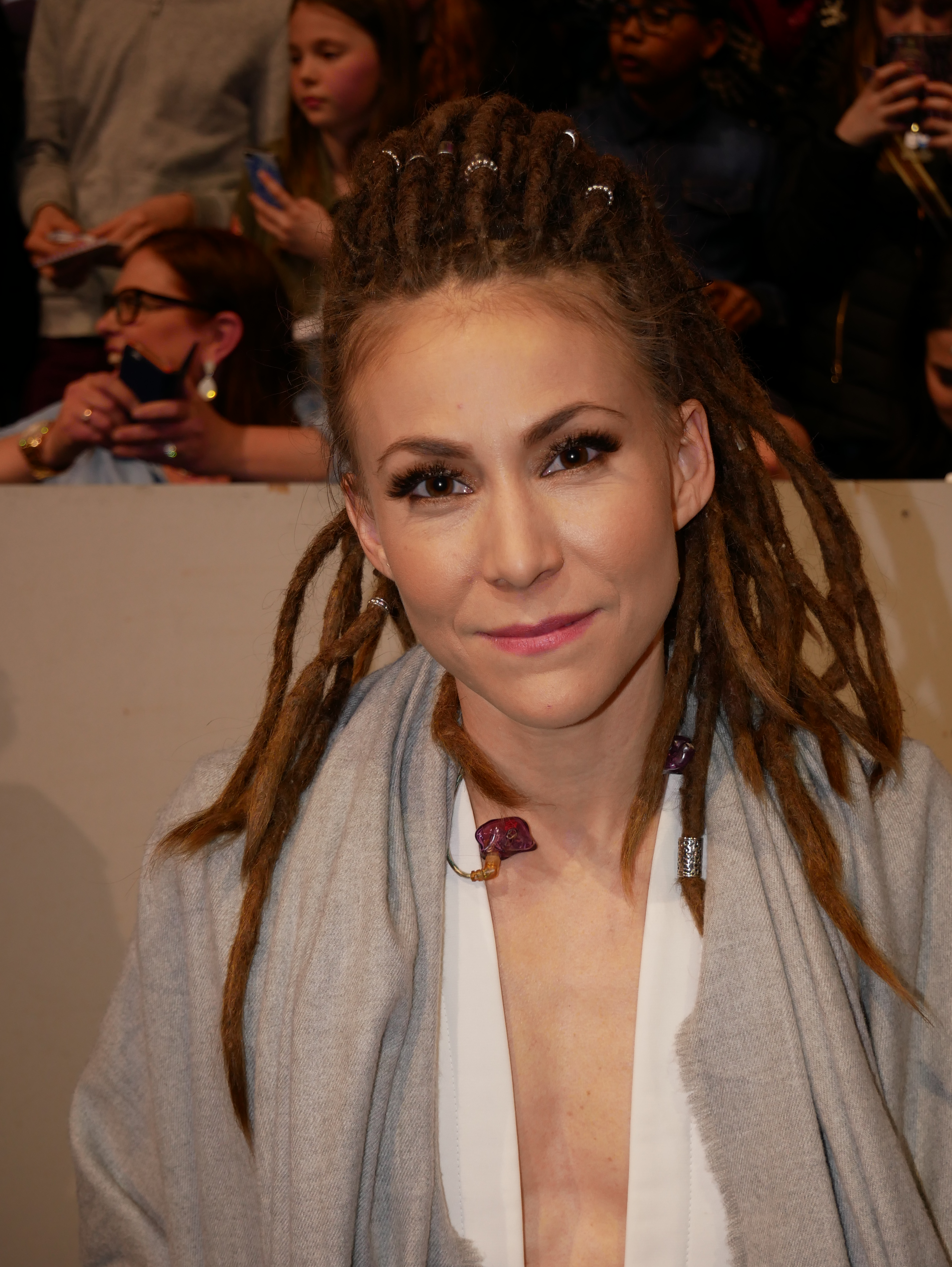 Melodifestivalen 2017, final Mariette Hansson